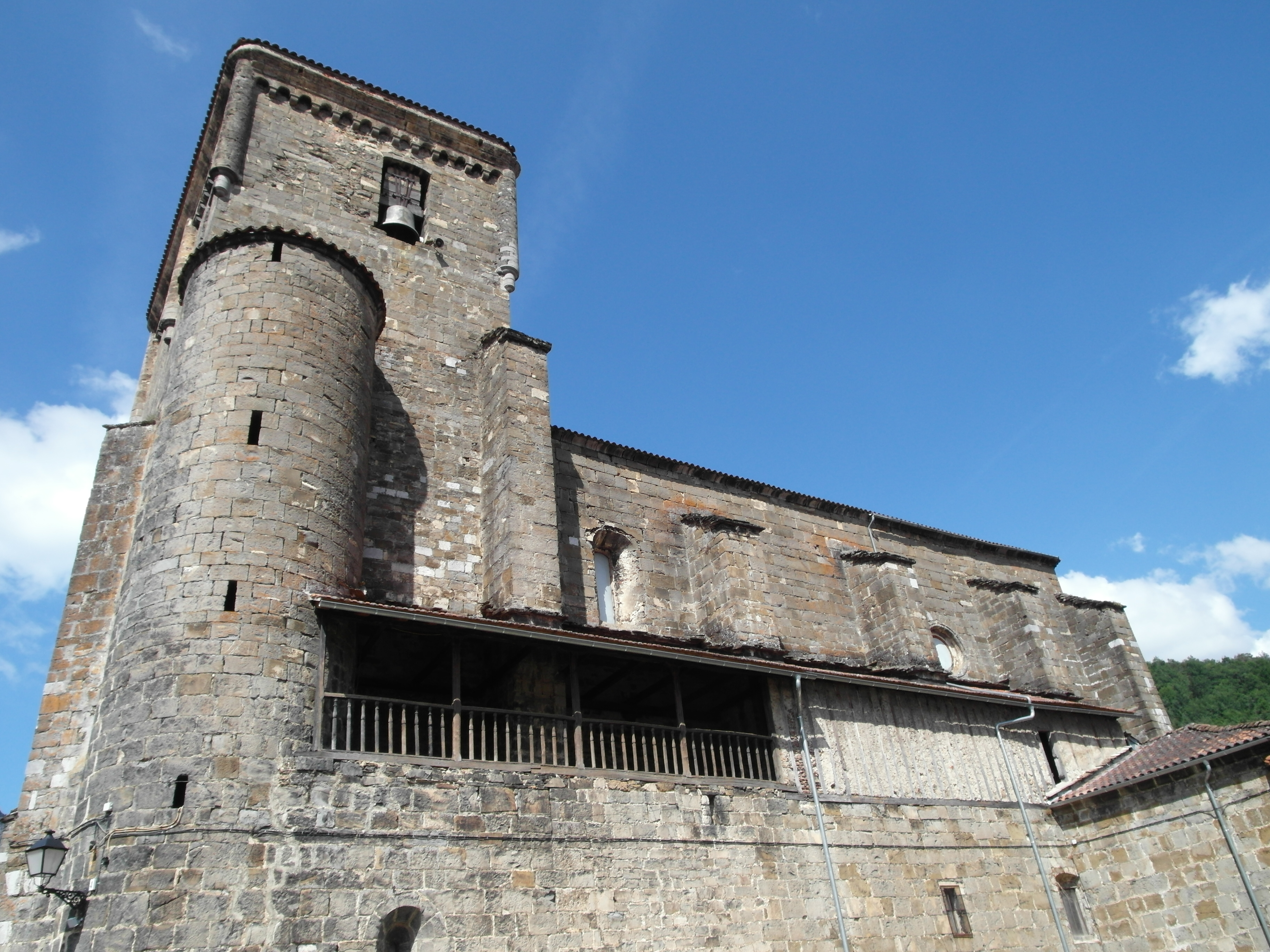 Vista parcial de la iglesia de IsabaEuskara: Izabako herri elizaren ikuspegi partziala